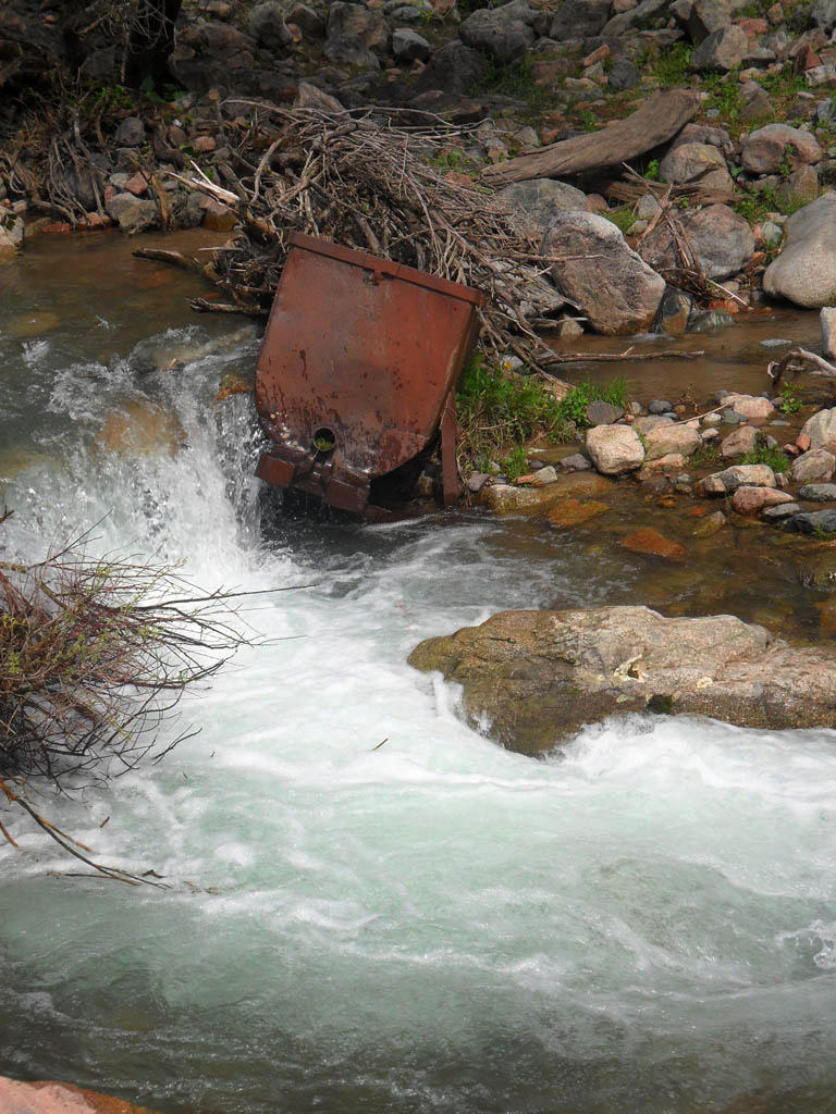 Остатки геологической техники в русле Нурекаты.